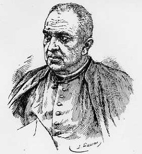 Dibujo del obispo de León, D. Juan Manuel Sanz y Saravia